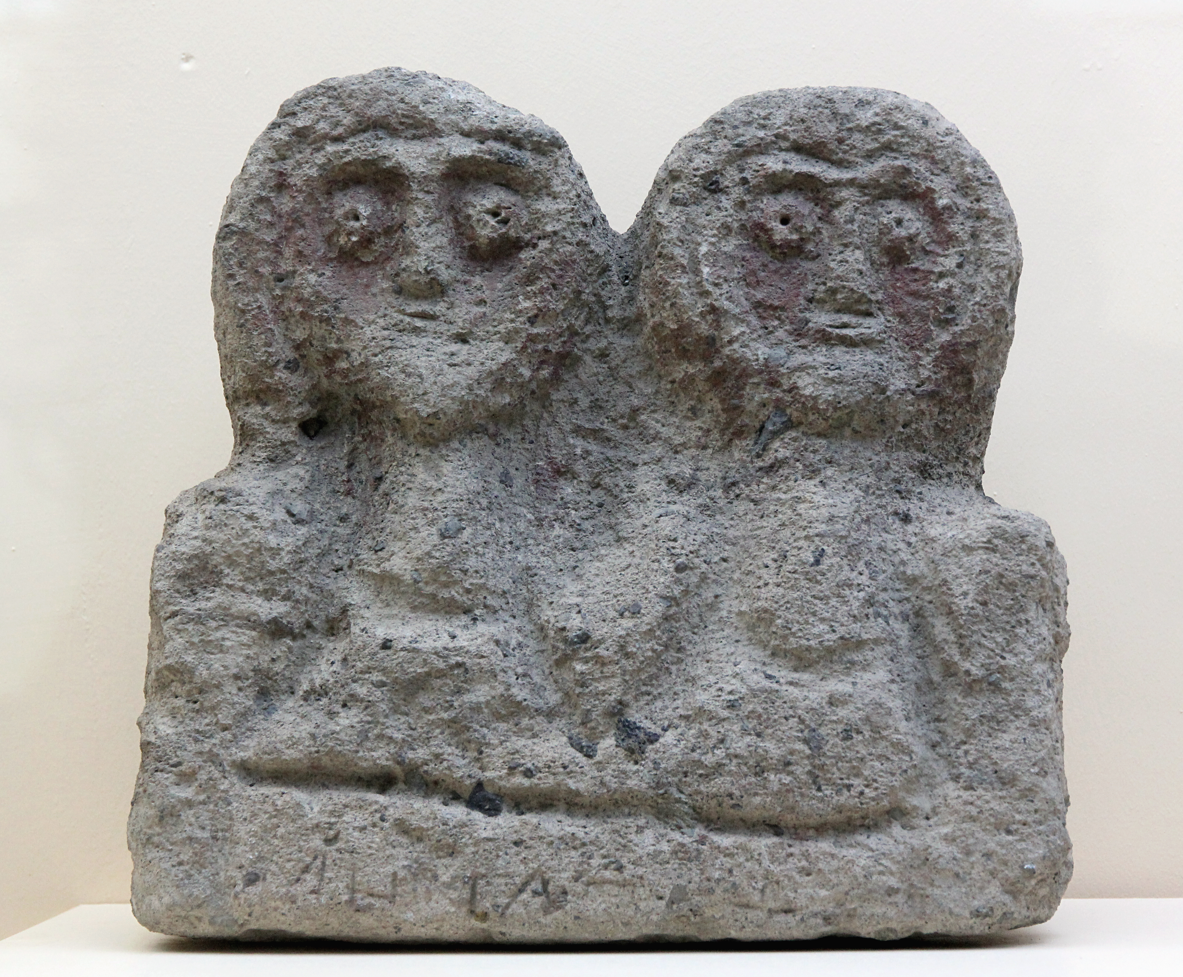 Archäologisches Museum Sivas, Zentraltürkei, römische Skulptur